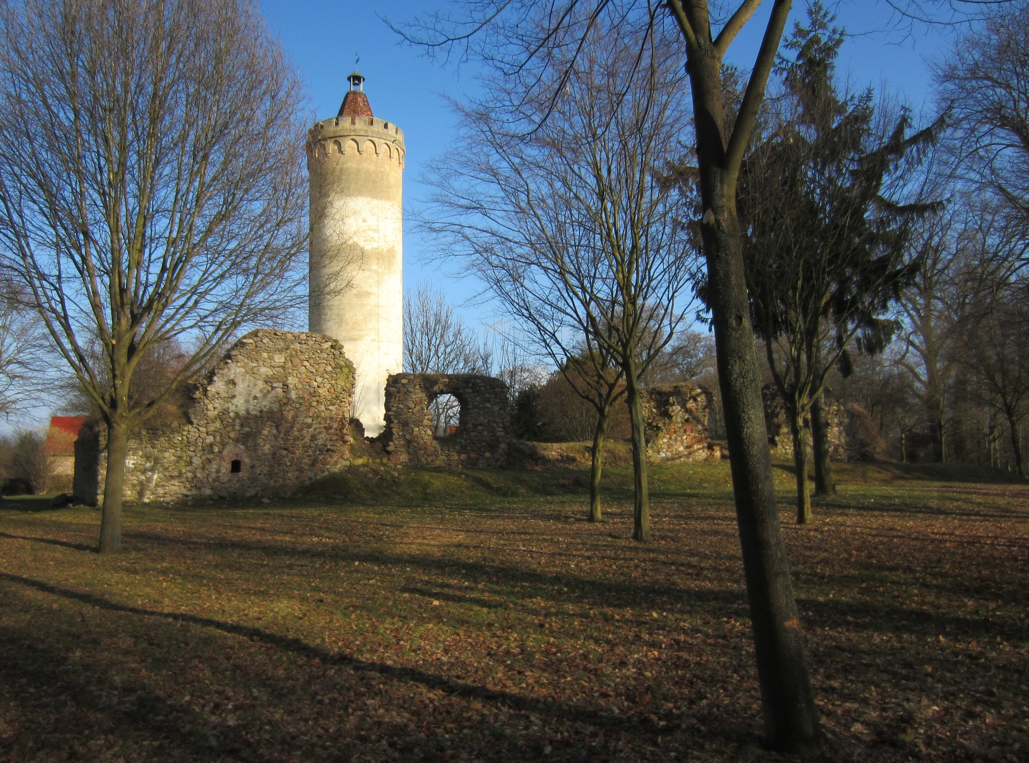 Bornsdorf, Gemeinde Heideblick, denkmalgeschützte Schlossruine mit erhaltenem Rundturm